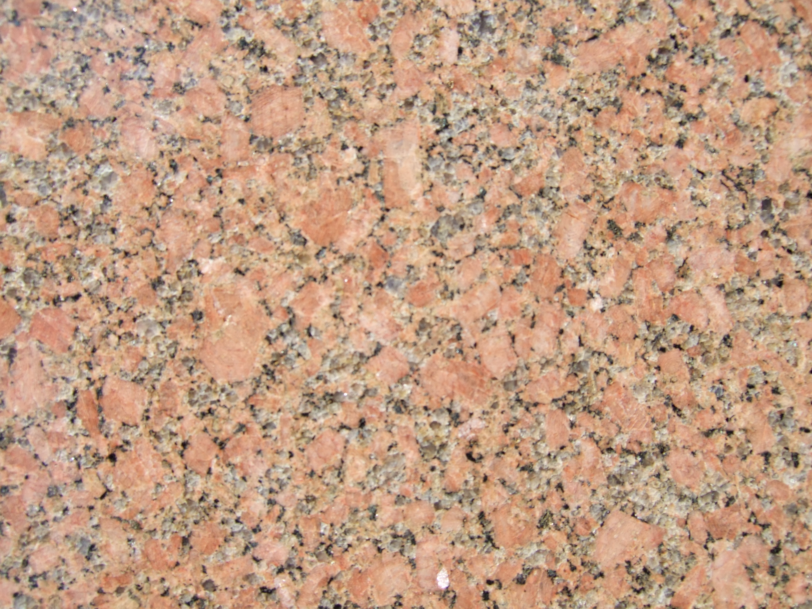 Fjaere granite